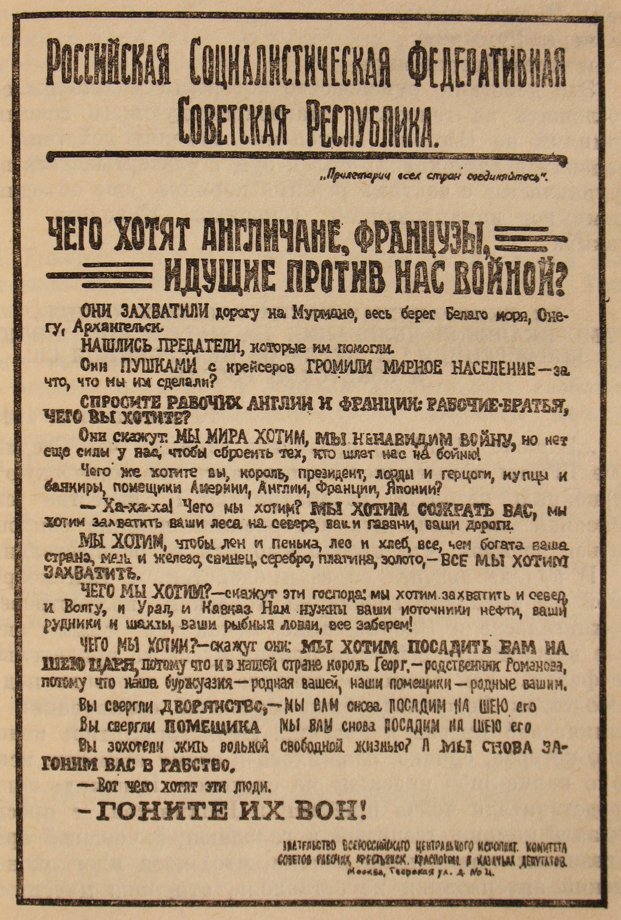 РСФСР. Листовка против иностранной интервенции. 1918 (после высадки интервентов на Мурмане). Чего хотят англичане, французы, идущие против нас войной?.. -Гоните их вон! Издательство ВЦИК Советов. Москва, Тверская ул.